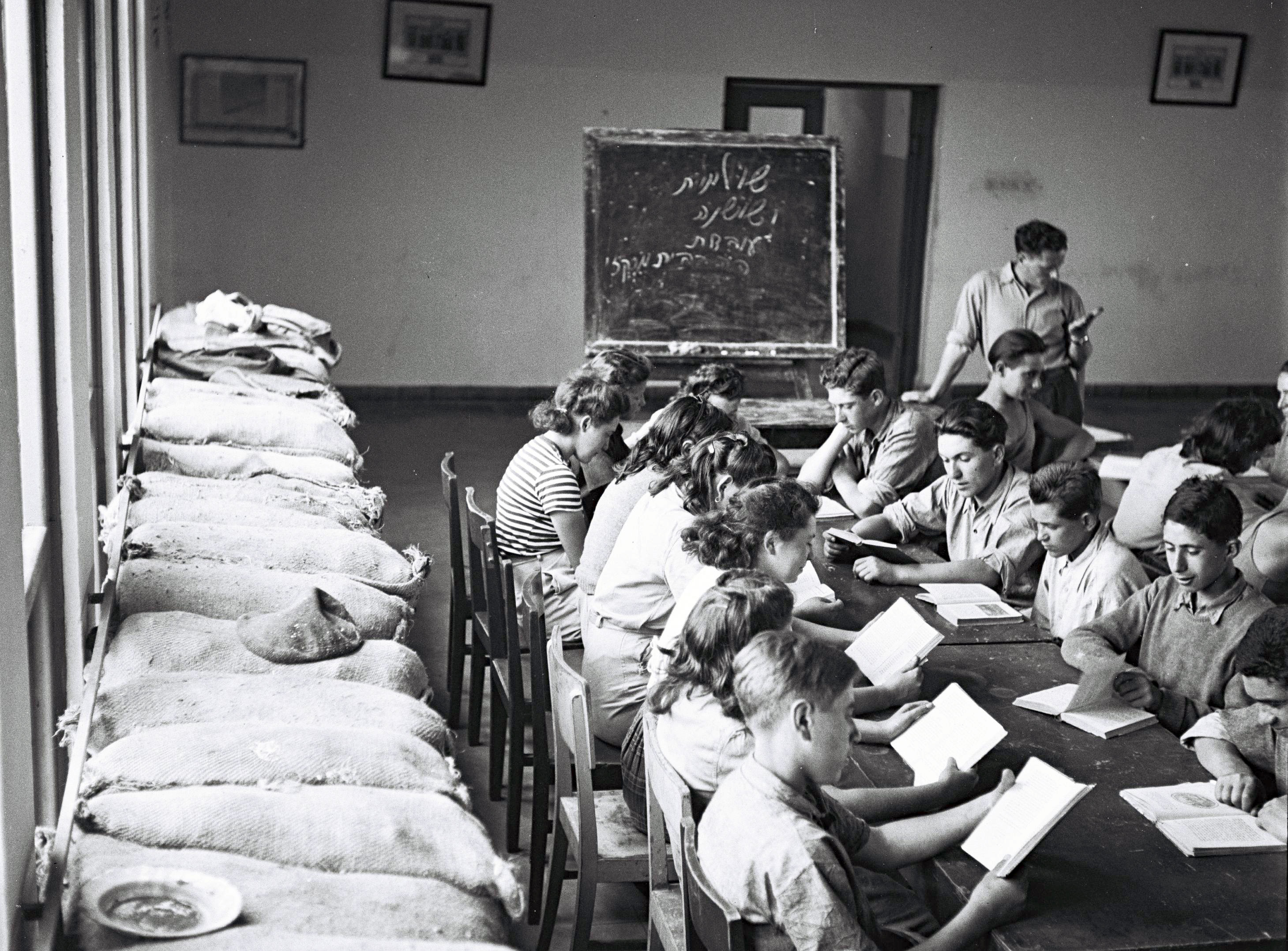 YOUTH ALIYA YOUNGSTERS STUDYING AT THE AYANOT AGRICULTURAL SCHOOL NEAR NESS ZIONA. בני נוער שלעליית הנוער לומדים בכיתתם בבית הספר החקלאי עיינות ליד נס ציונה.